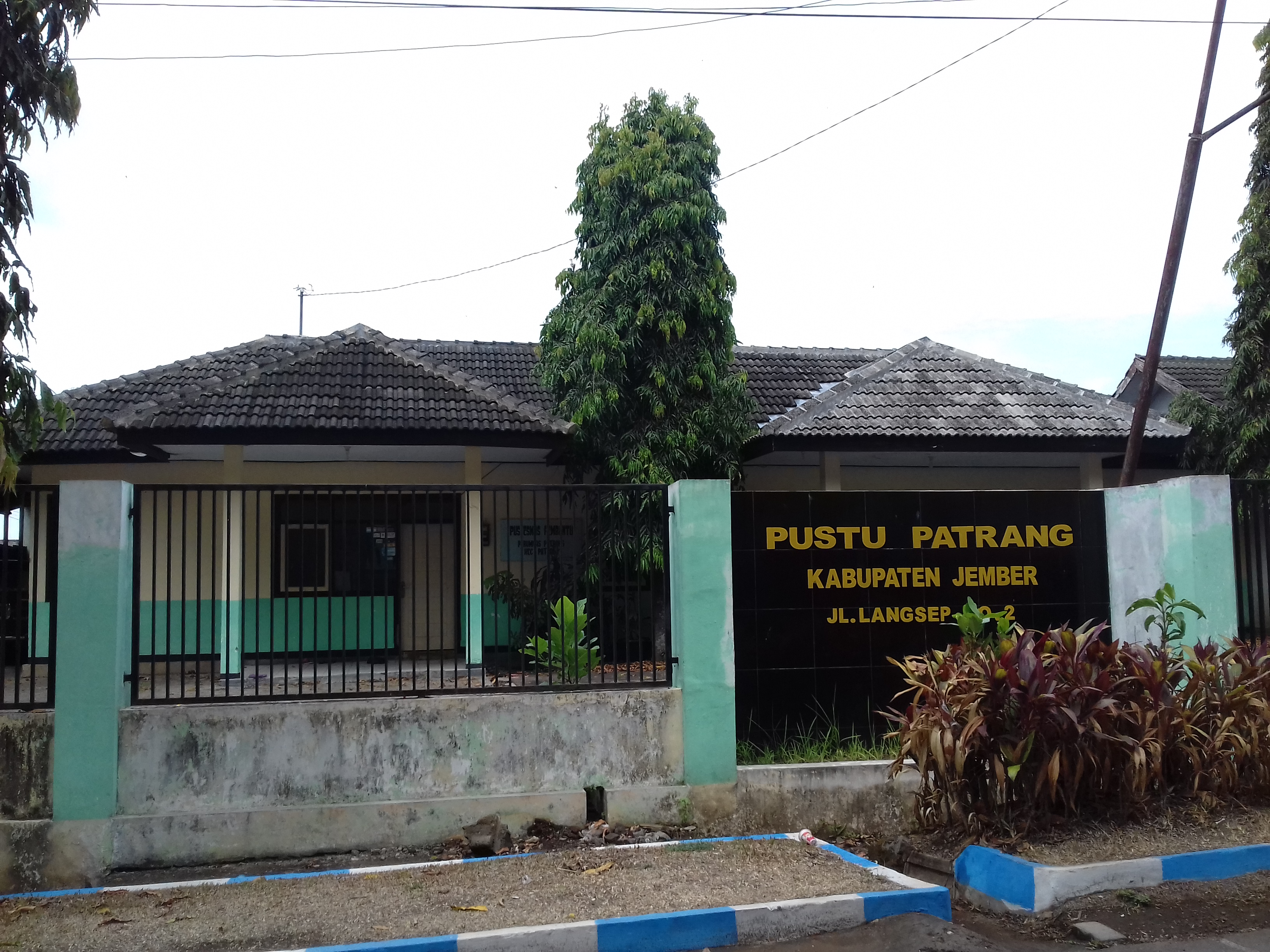 Tampak depan Puskesmas Pembantu Patrang